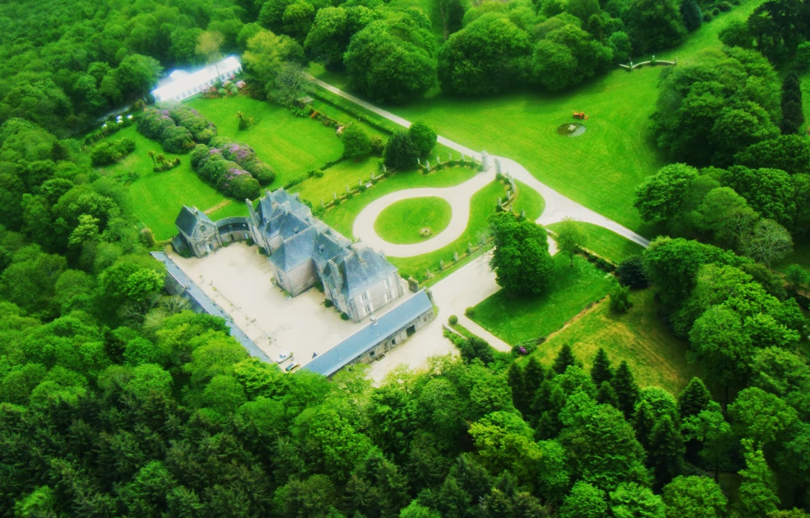 Vue du ciel du château du Guilguiffin, vue du parc, vue de la cour d'honneur